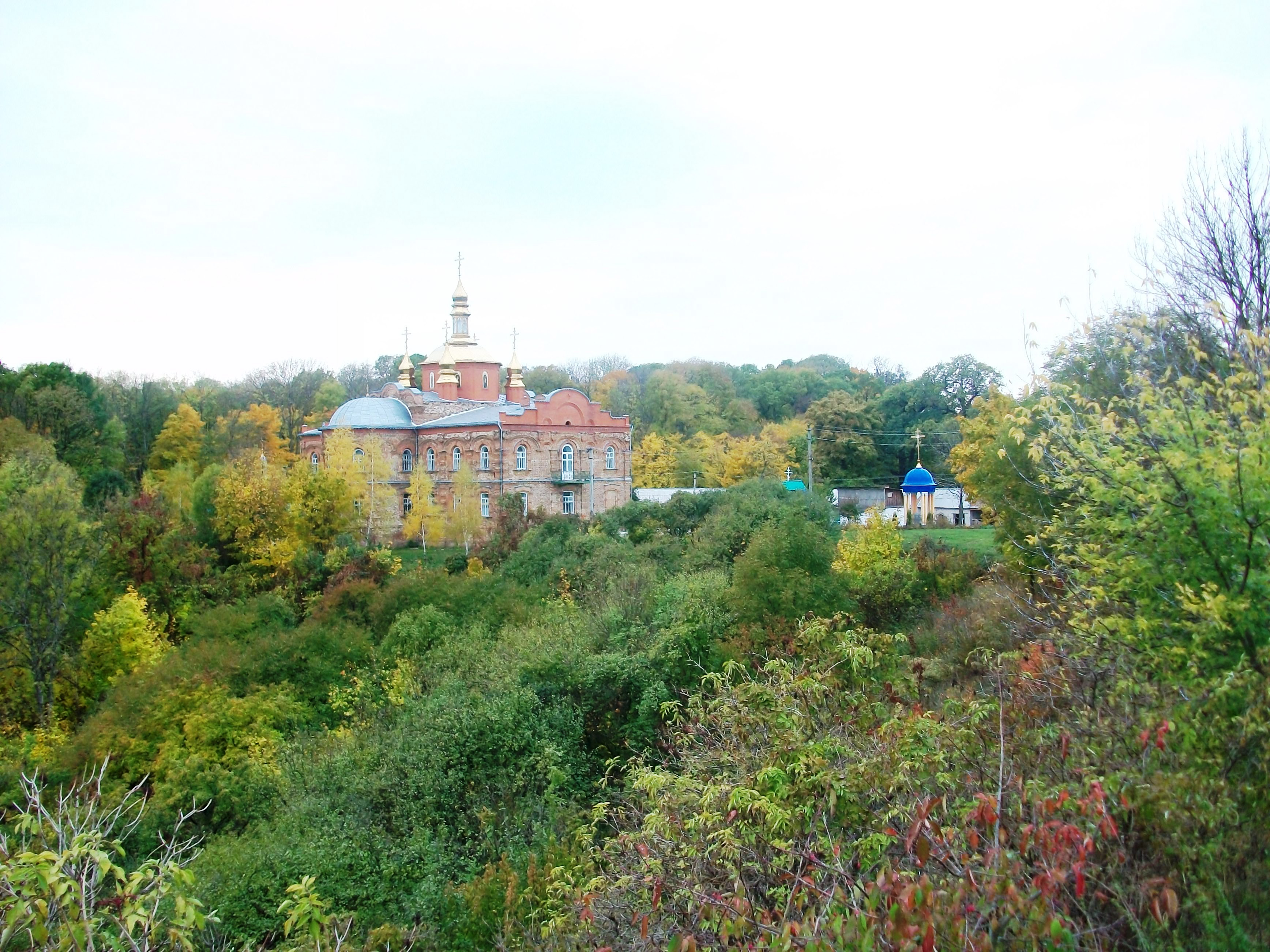 Ильинская церковь (Софрониевский монастырь)